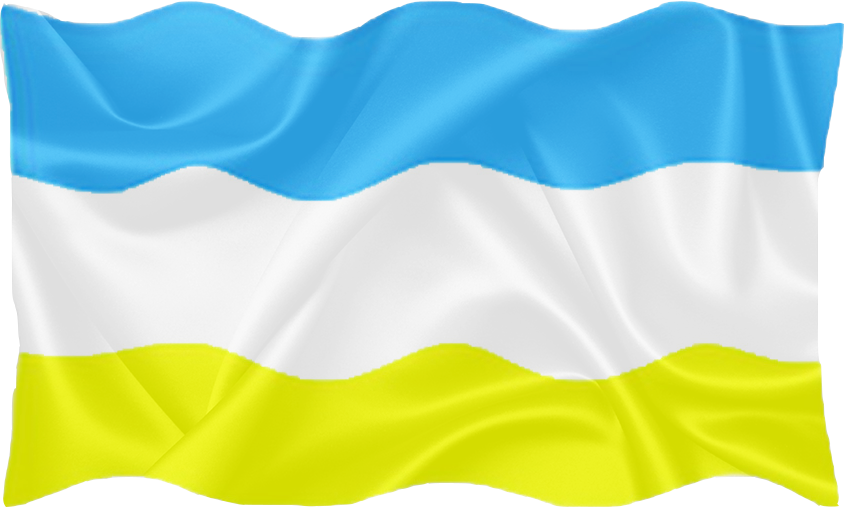 Bandera del Distrito de General Artigas